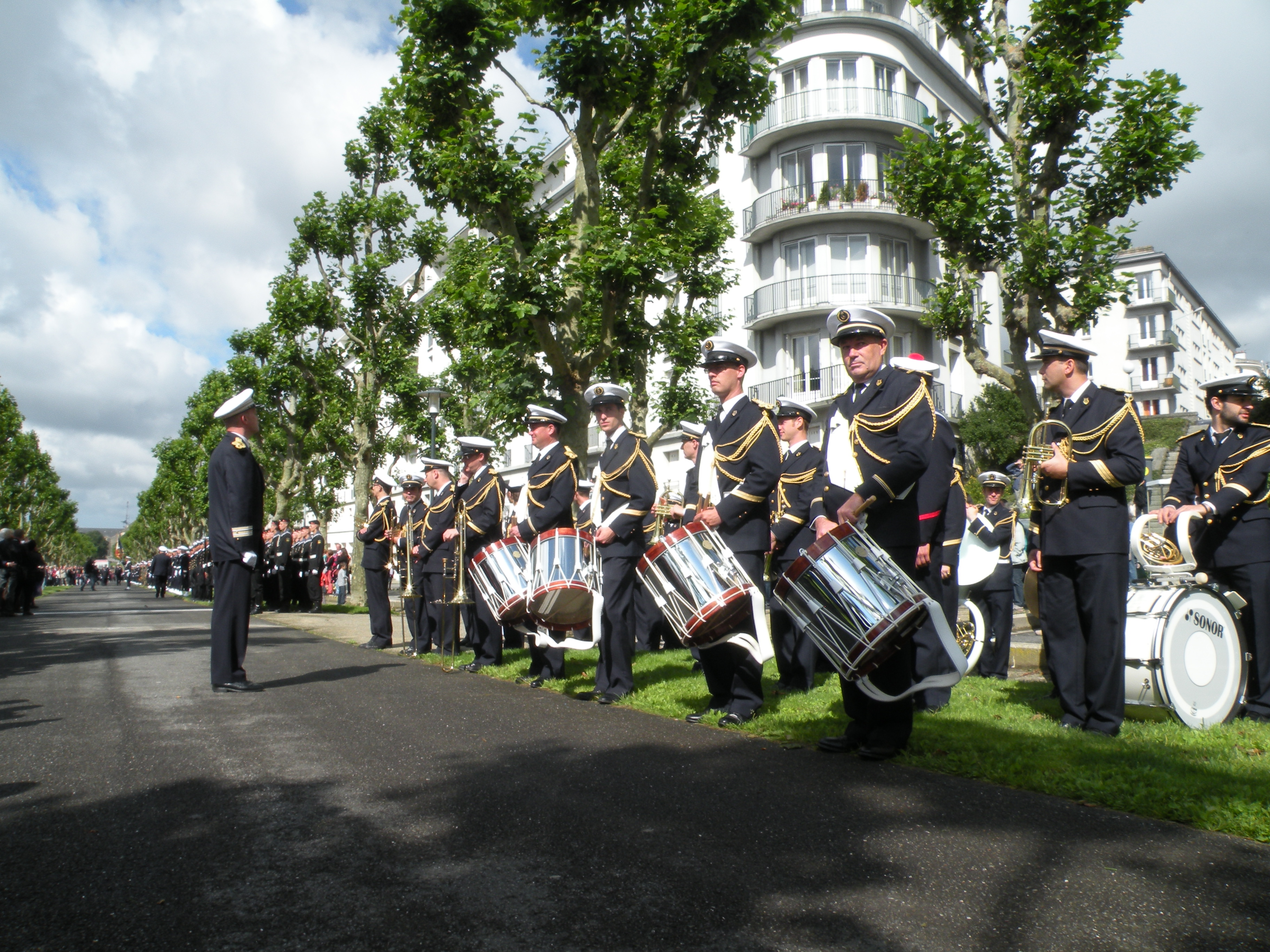 Défilé militaire du 14 juillet à Brest sur le cours Dajot.